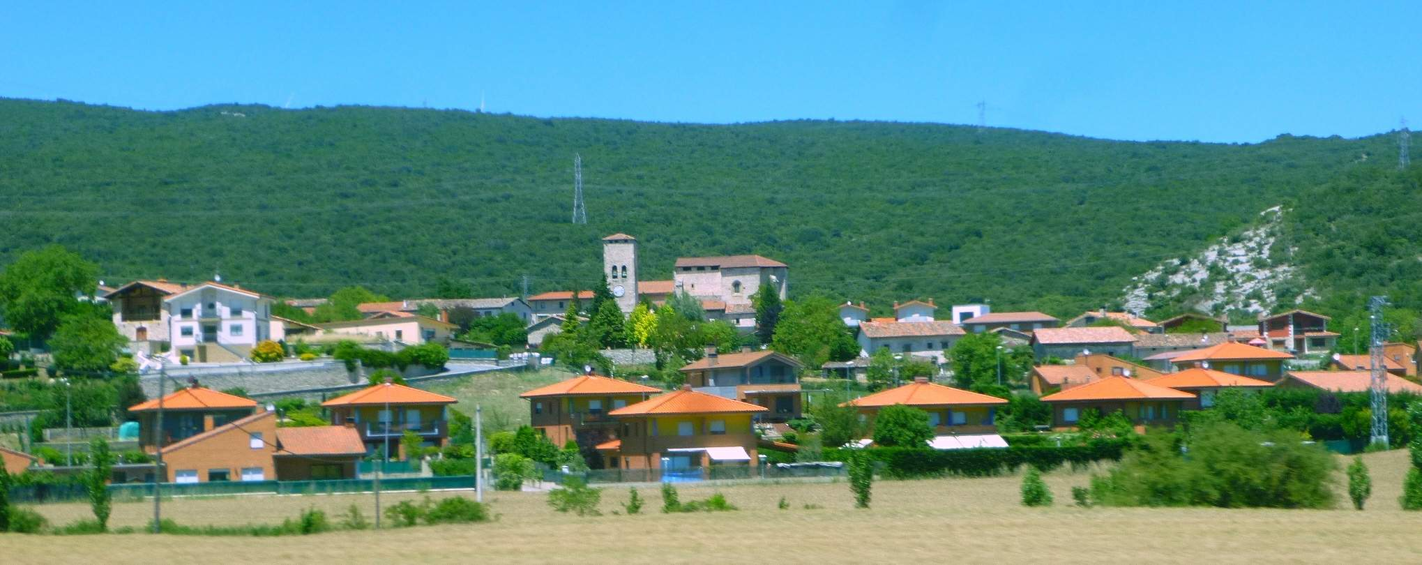 Olabarri/Ollávarre (Iruña de Oca, Álava)